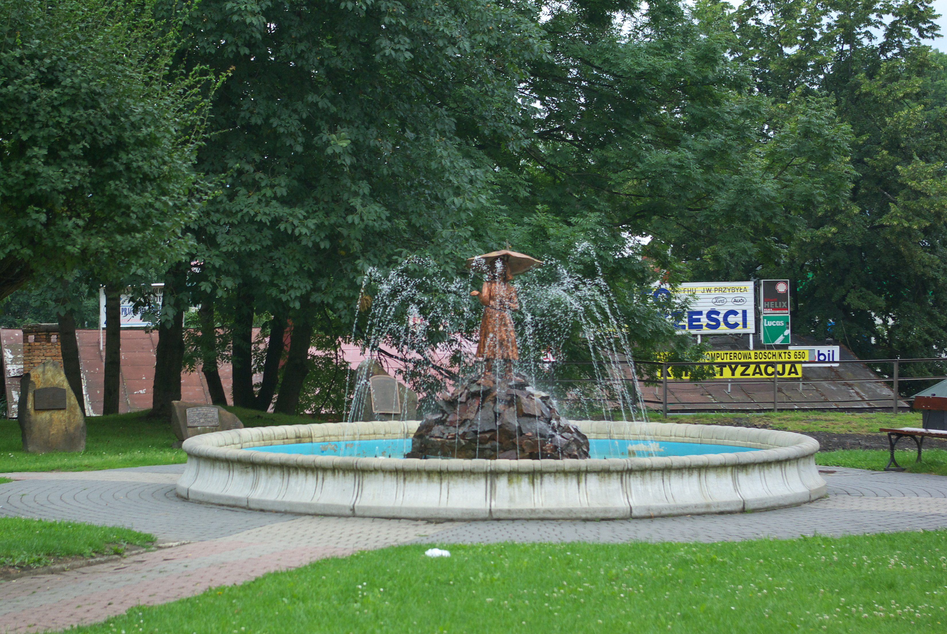 Fontanna Plac Miast Partnerskich w Sanoku